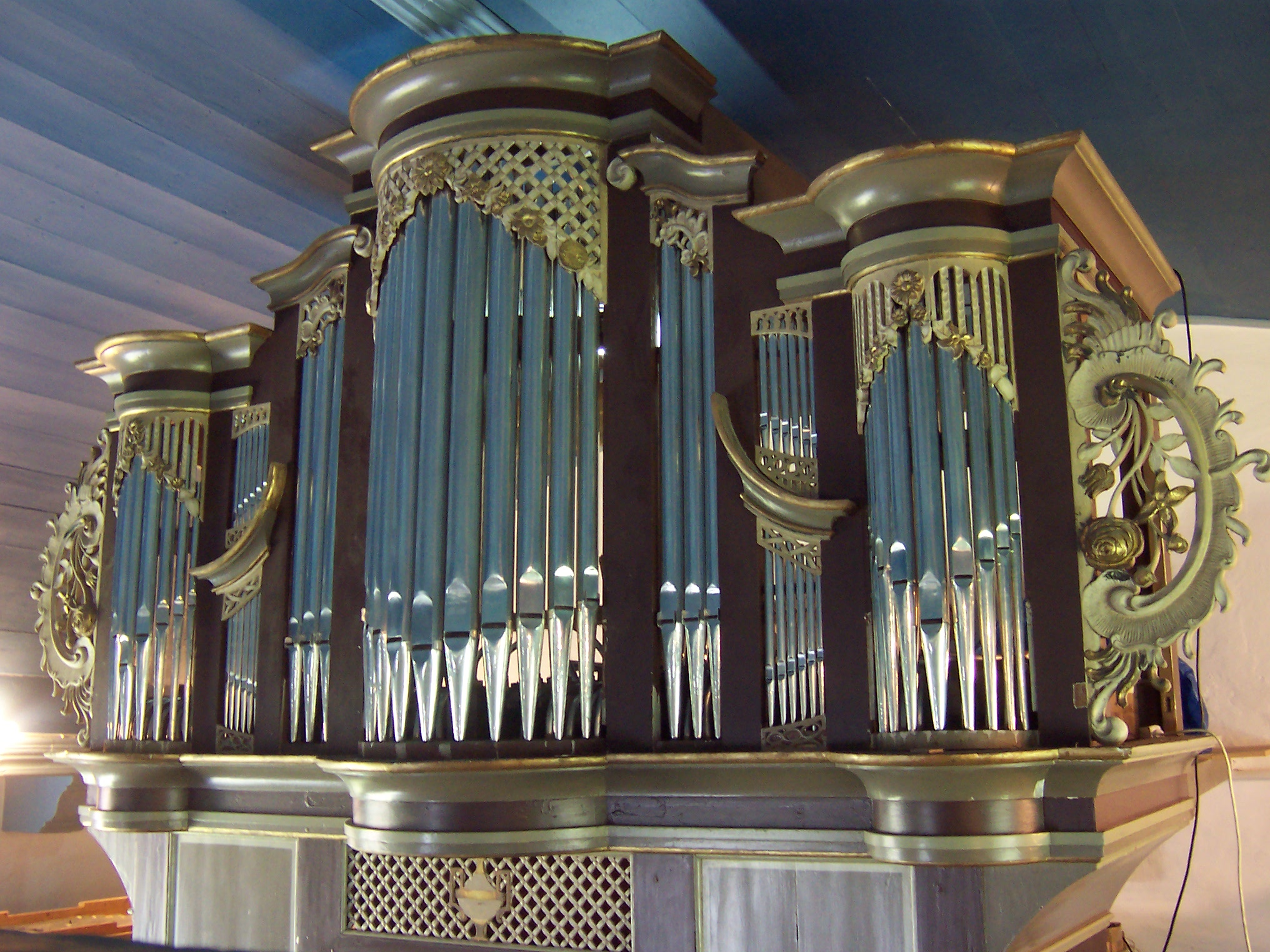 Orgel in Collinghorst während der Restaurierung